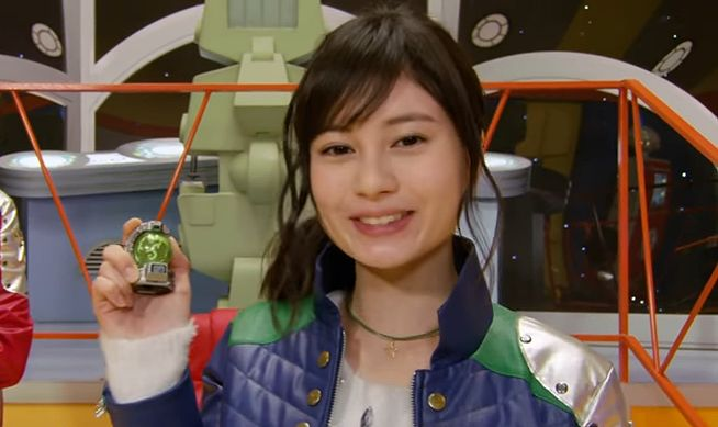 カメレオングリーン